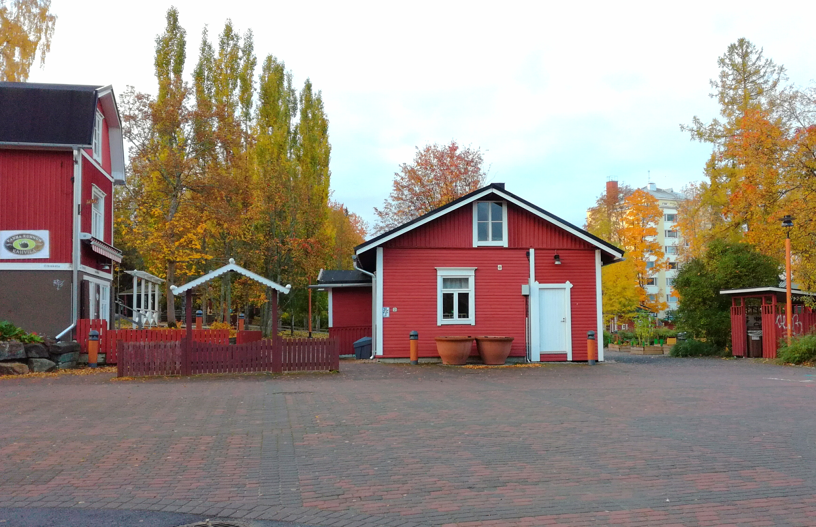 Mäki-Matin perhepuisto Jyväskylässä.